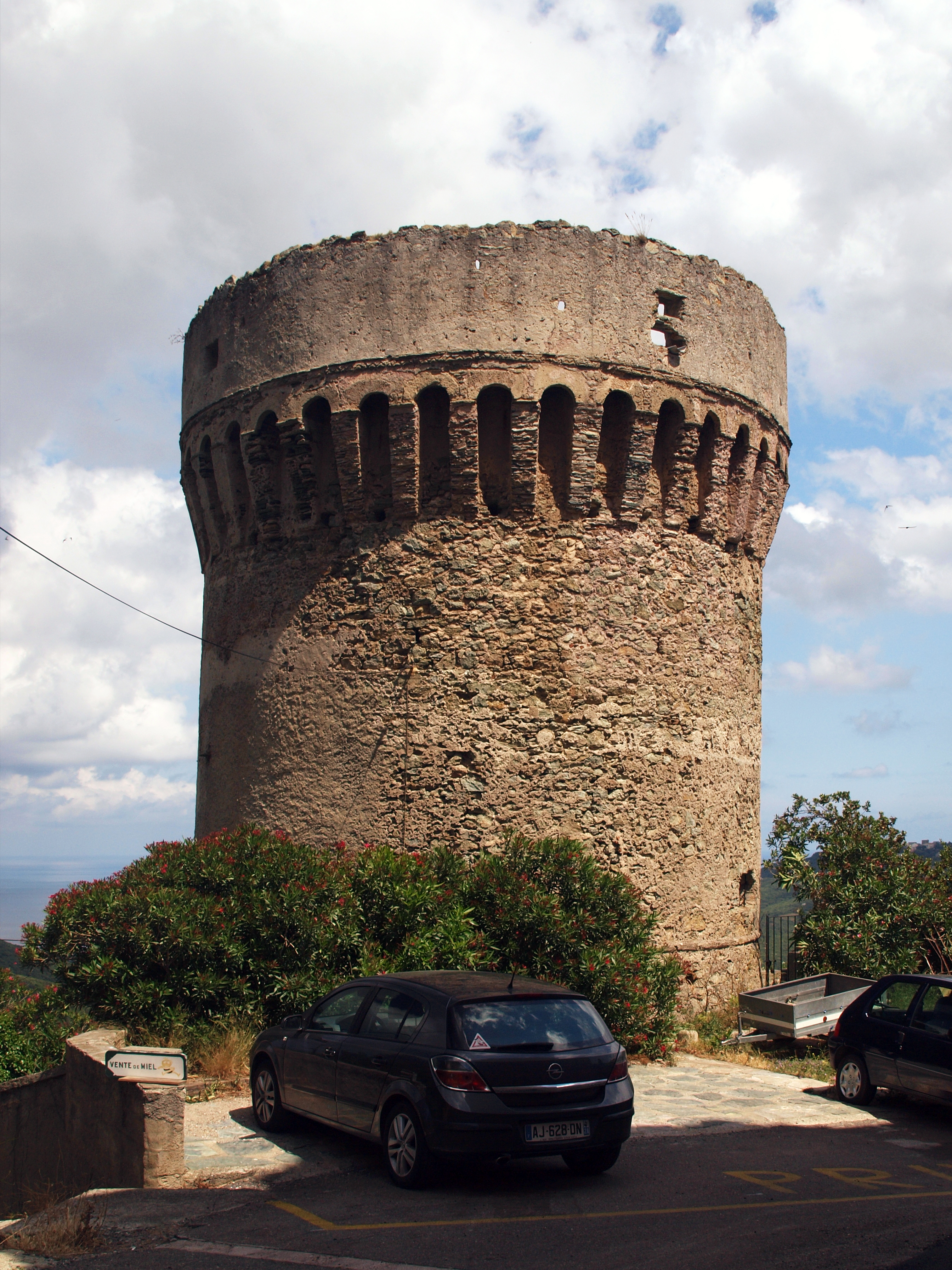 Rogliano (Corse) - Tour della Parocchia (ou Torre Franceschi)